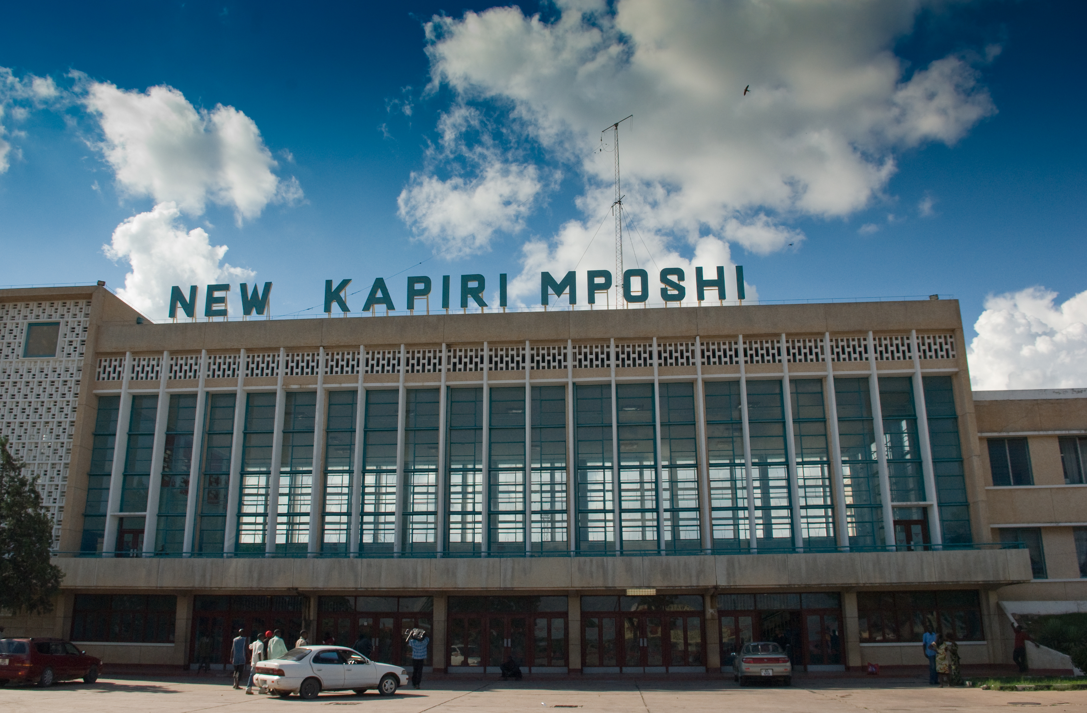 Tazara Rail